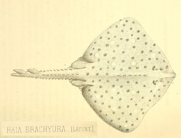 Оригинальное изображение